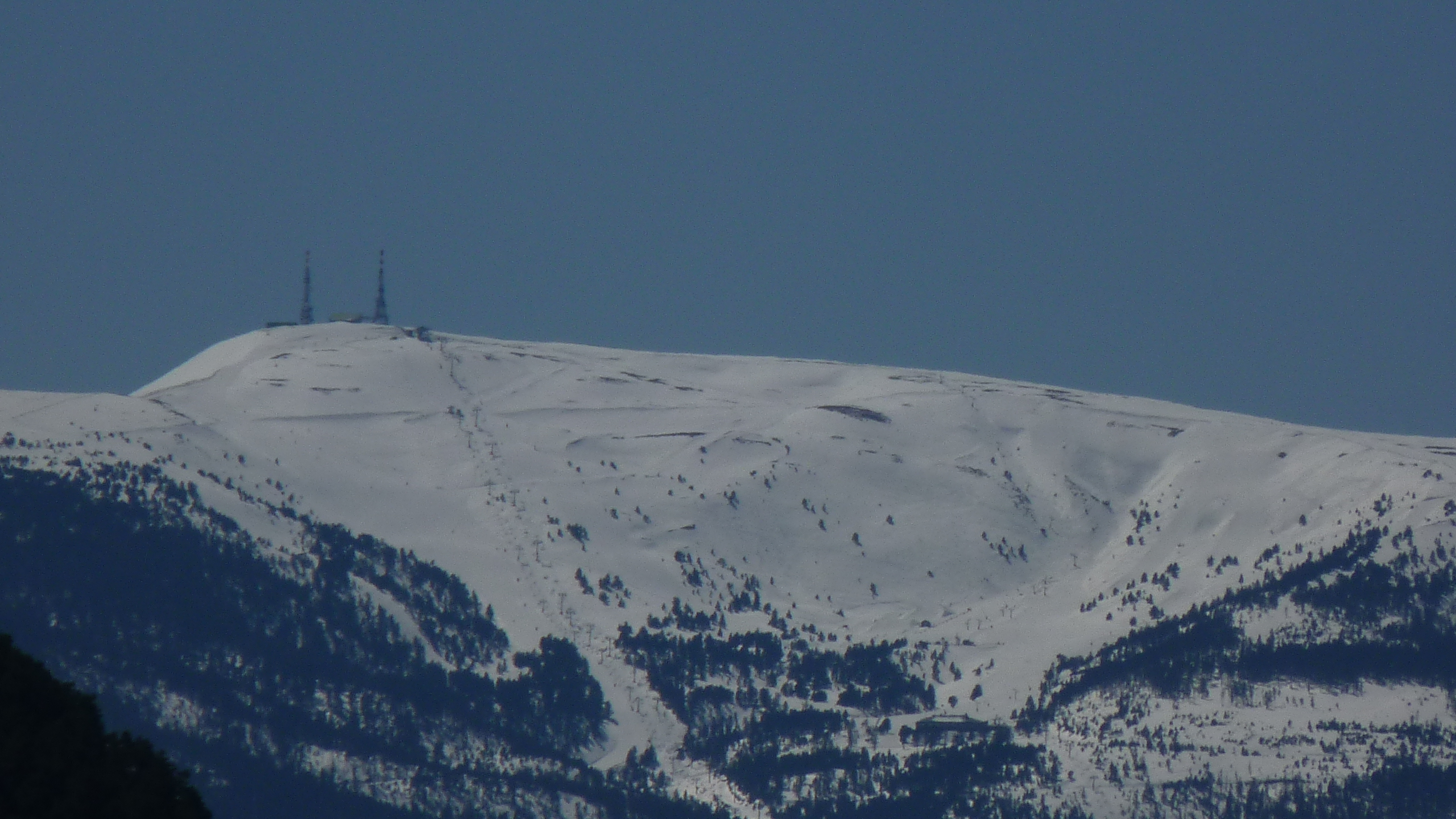 Estació d'esquí de Port Ainé, vista des de la Vall de Cardós